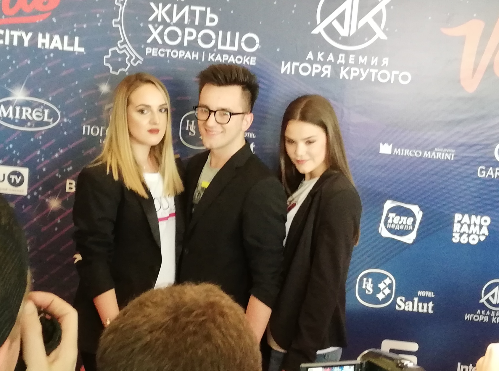 I D mol, rappresentanti del Montenegro all'Eurofestival 2019, al Pre-Party di Mosca